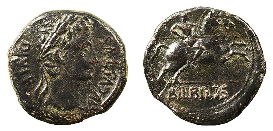 As romano de bronce acuñado en Bilbilis, la actual Calatayud (provincia de Zaragoza, España). En el anverso muestra una cabeza masculina laureada rodeada por la leyenda "AVGVSTVS DIVI F"; en el reverso, un jinete con lanza sobre la leyenda "BILBILIS".